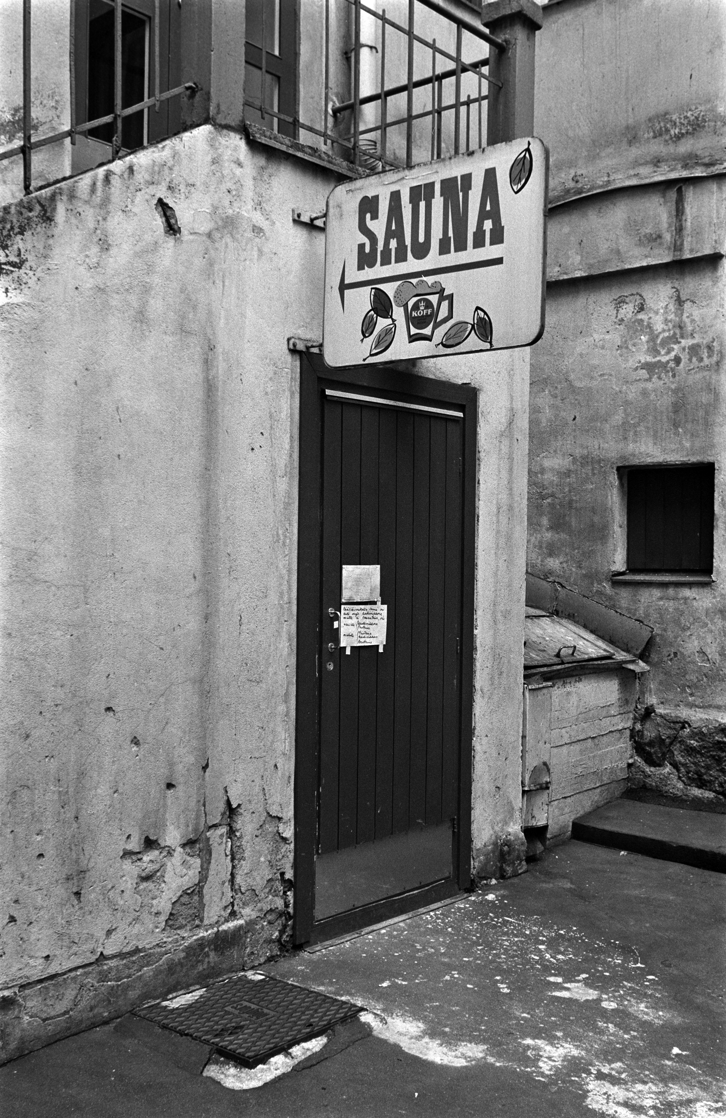 Yleisen saunan ovi ja kyltti Kristianinkatu 7:n pihan puolella.